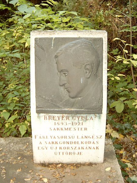 Breuer Gyula (Budapest, 1893. április 30. – Pozsony, 1921. november 10.) mérnök, sakkmester sírja Budapesten. Kerepesi temető: 33/3-1-6 [szobrász: Búza Barna]